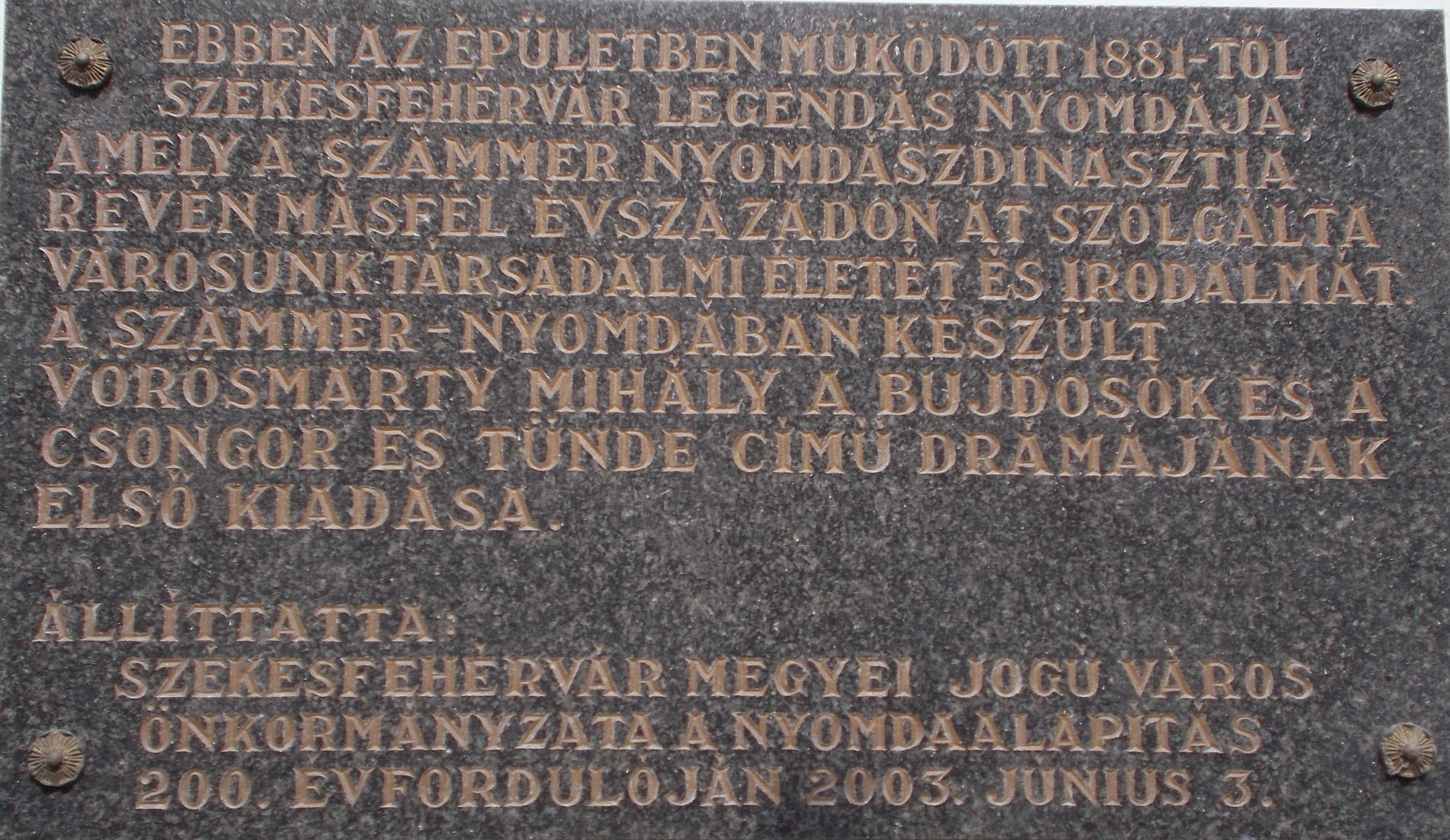 Emléktábla. Földszintes lakóház. Korábban Számmer nyomda a 'Csongor és Tünde' első kiadója. - Magyarország, Fejér megye, Székesfehérvár, Belváros, Székesfehérvár, Bástya utca 9